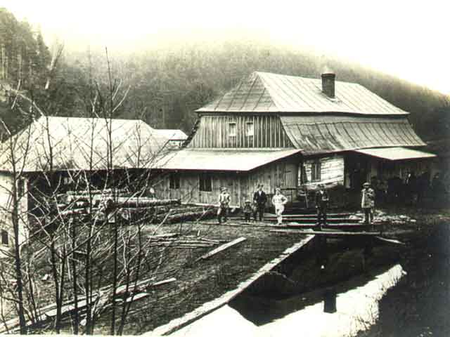 Mlýn Josefa Blažka v Podvicmanově